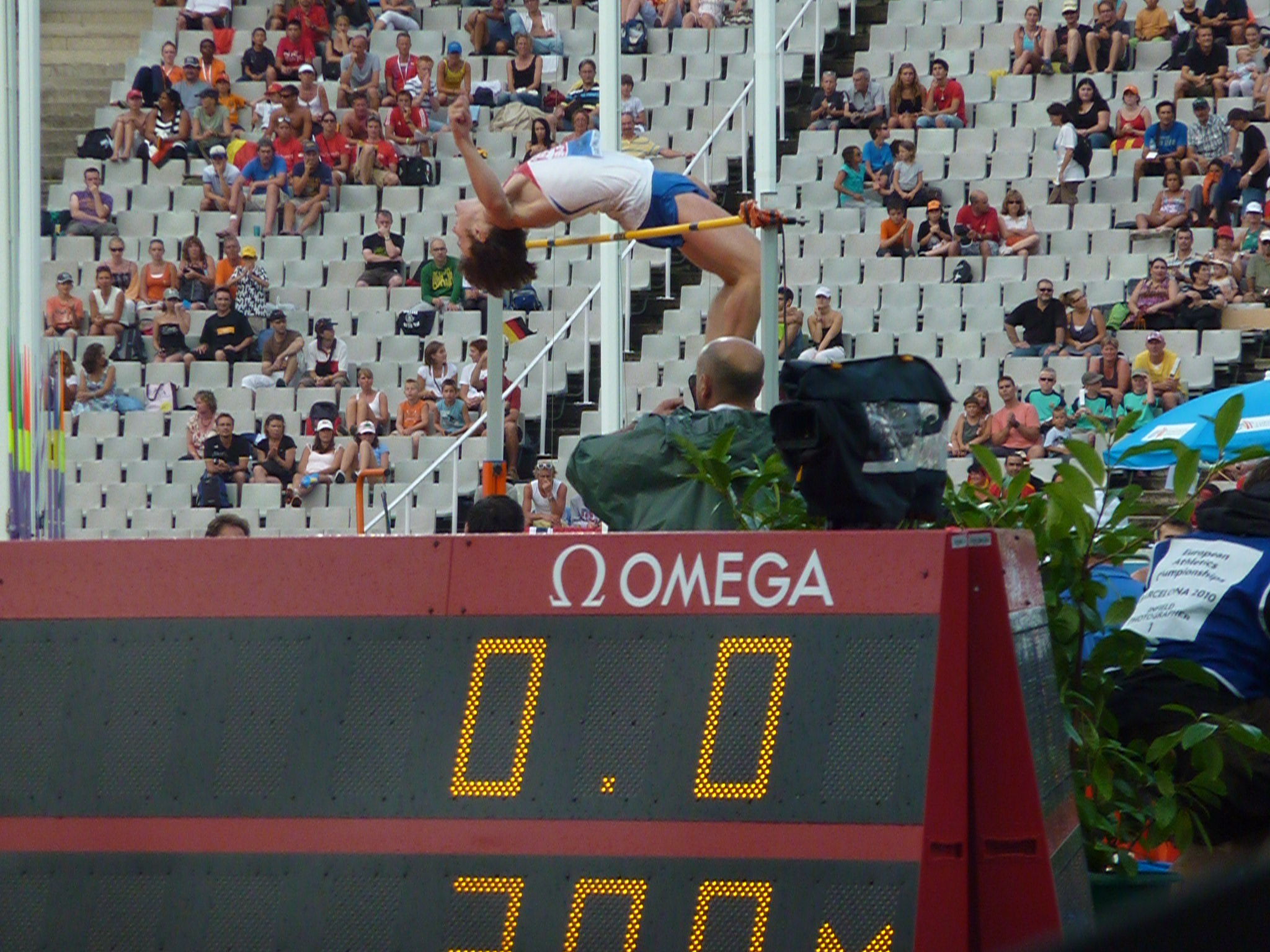 Aleksander Shustov